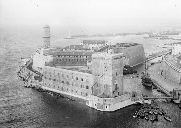 Titre(s) : [Marseille, 1900-1925] [Image fixe numérisée] / Frères Séeberger, photogr. Publication : [St Cyr] : [Direction du Patrimoine. Service des archives photographiques], [1900-1925] Editeur : France. Direction du patrimoine. Service des archives photographiques Note(s) : Acq. : Archives photographiques (Médiathèque du Patrimoine) (c) Caisse nationale des Monuments historiques